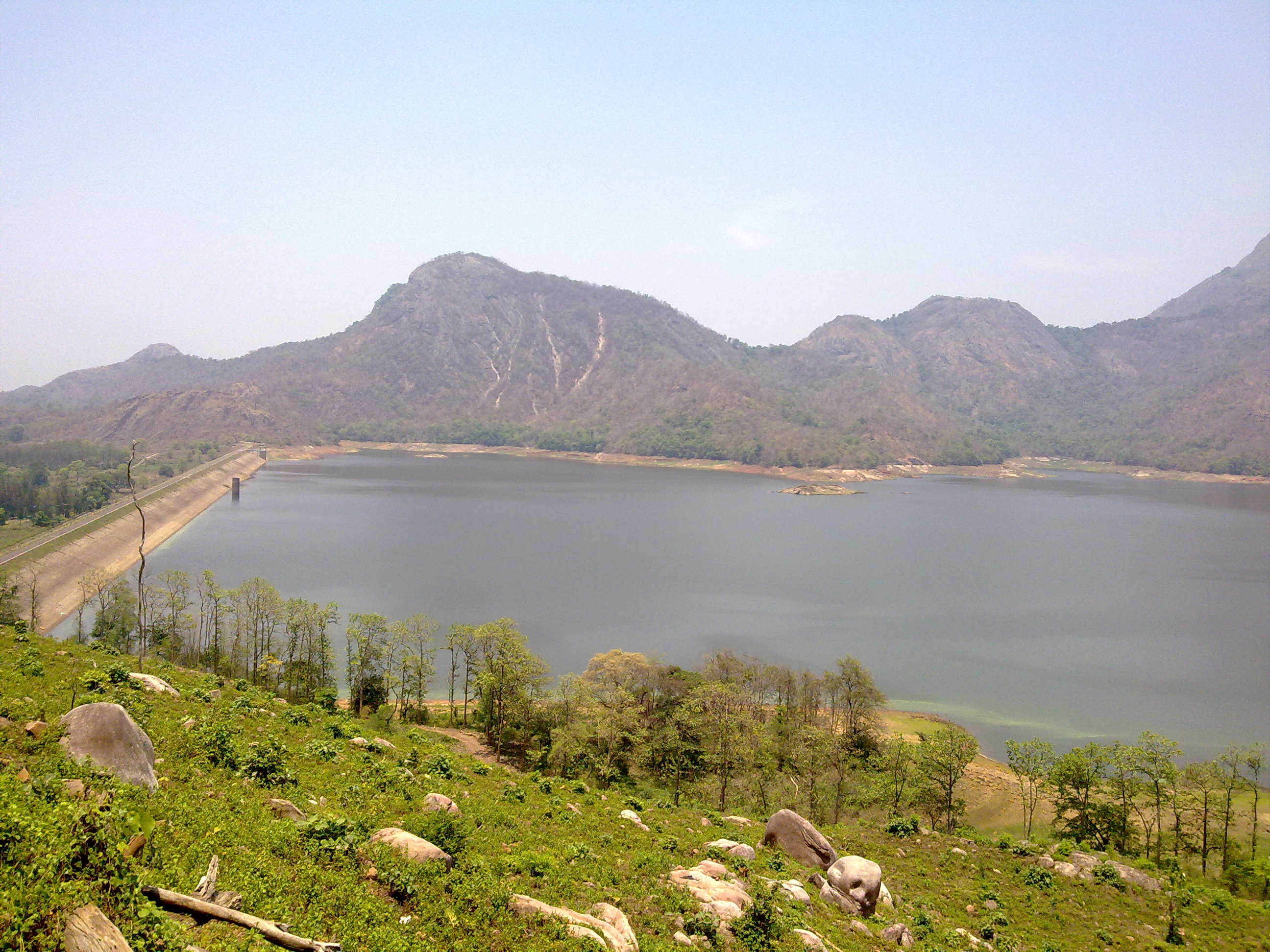 പോത്തുണ്ടി ഡാം, പാലക്കാട്